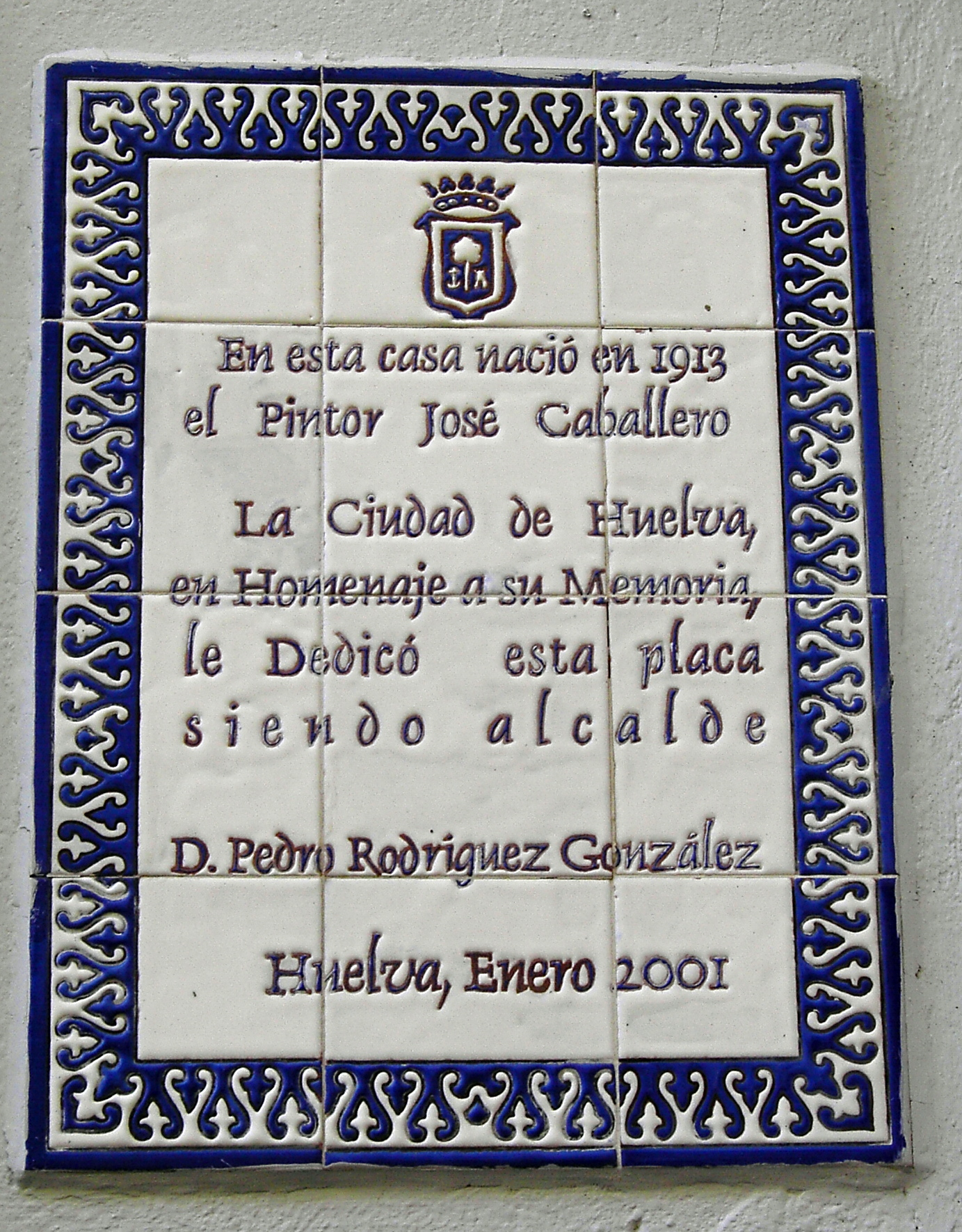 Placa conmemorativa a José Caballero